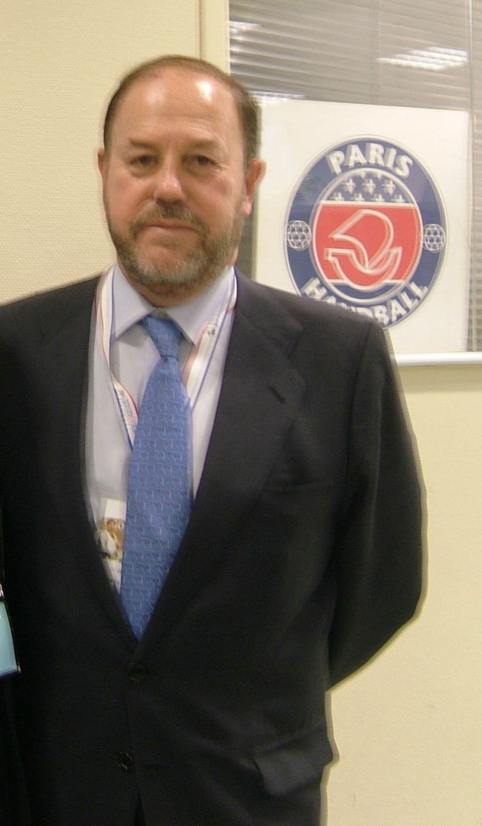 Antonio Espinós à l'open de Paris de karaté 2007